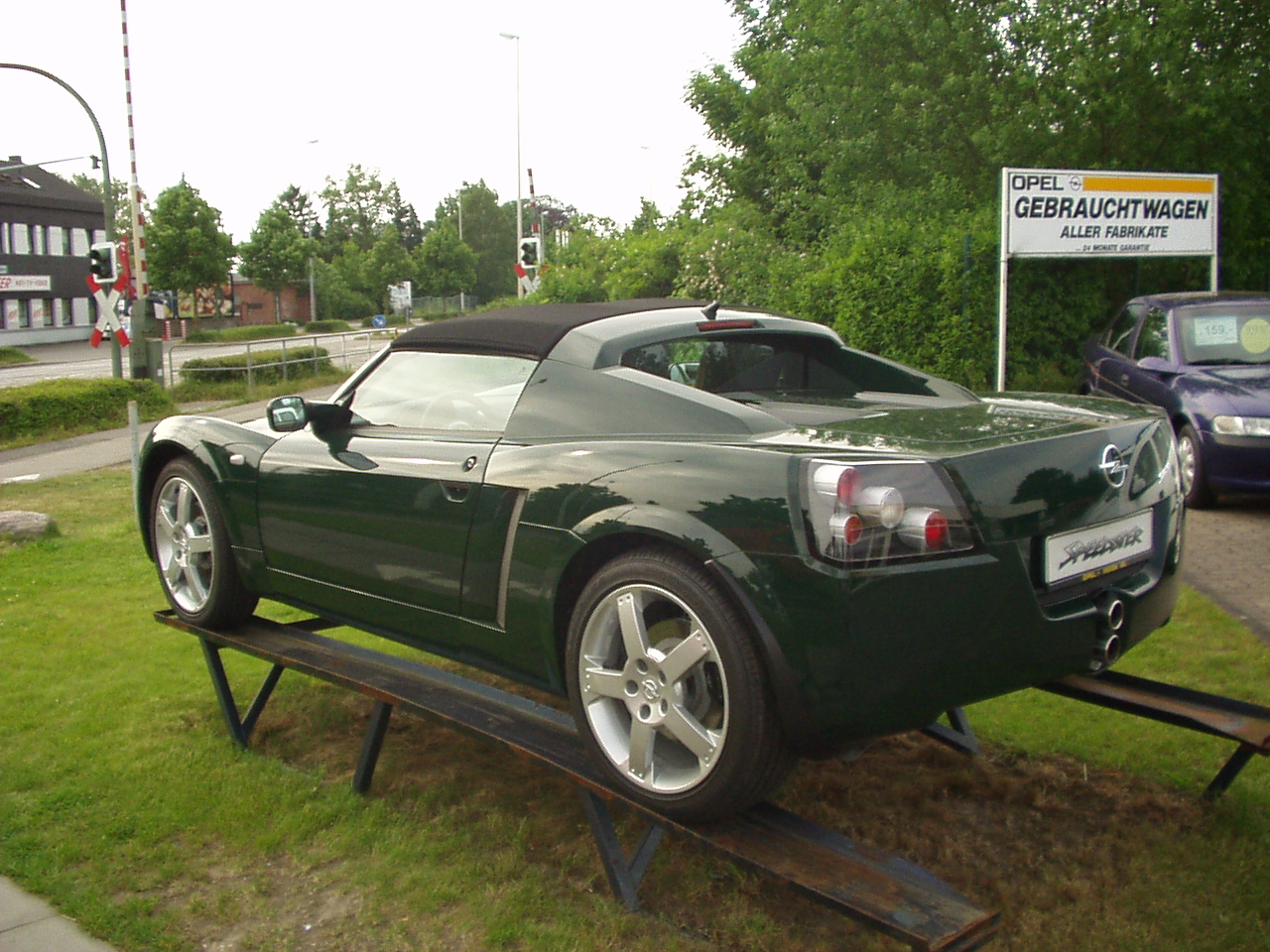 Opel Speedster in "british-racing-green"